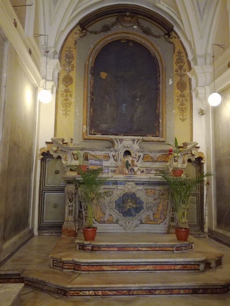 Altare, San Biagio Maggiore